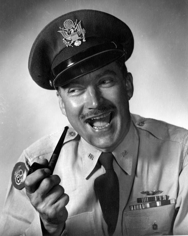 MacKinlay Kantor (1950)